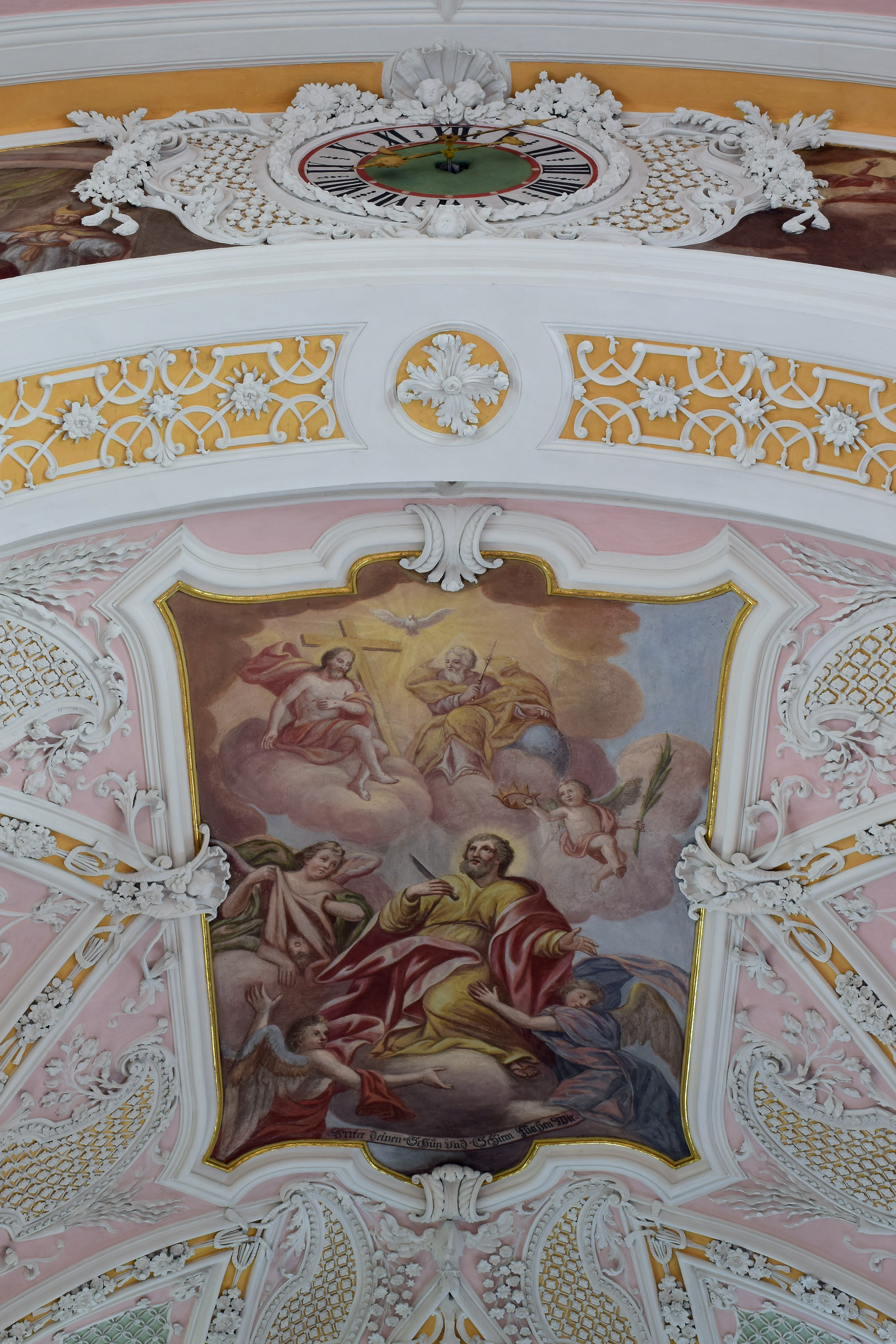 Kath. Pfarrkirche hl. Bartholomäus